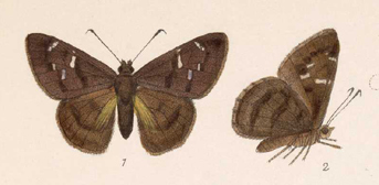 Cogia cajeta = Cogia cajeta (Herrich-Schäffer, 1869) (1: upperside, 2: underside)